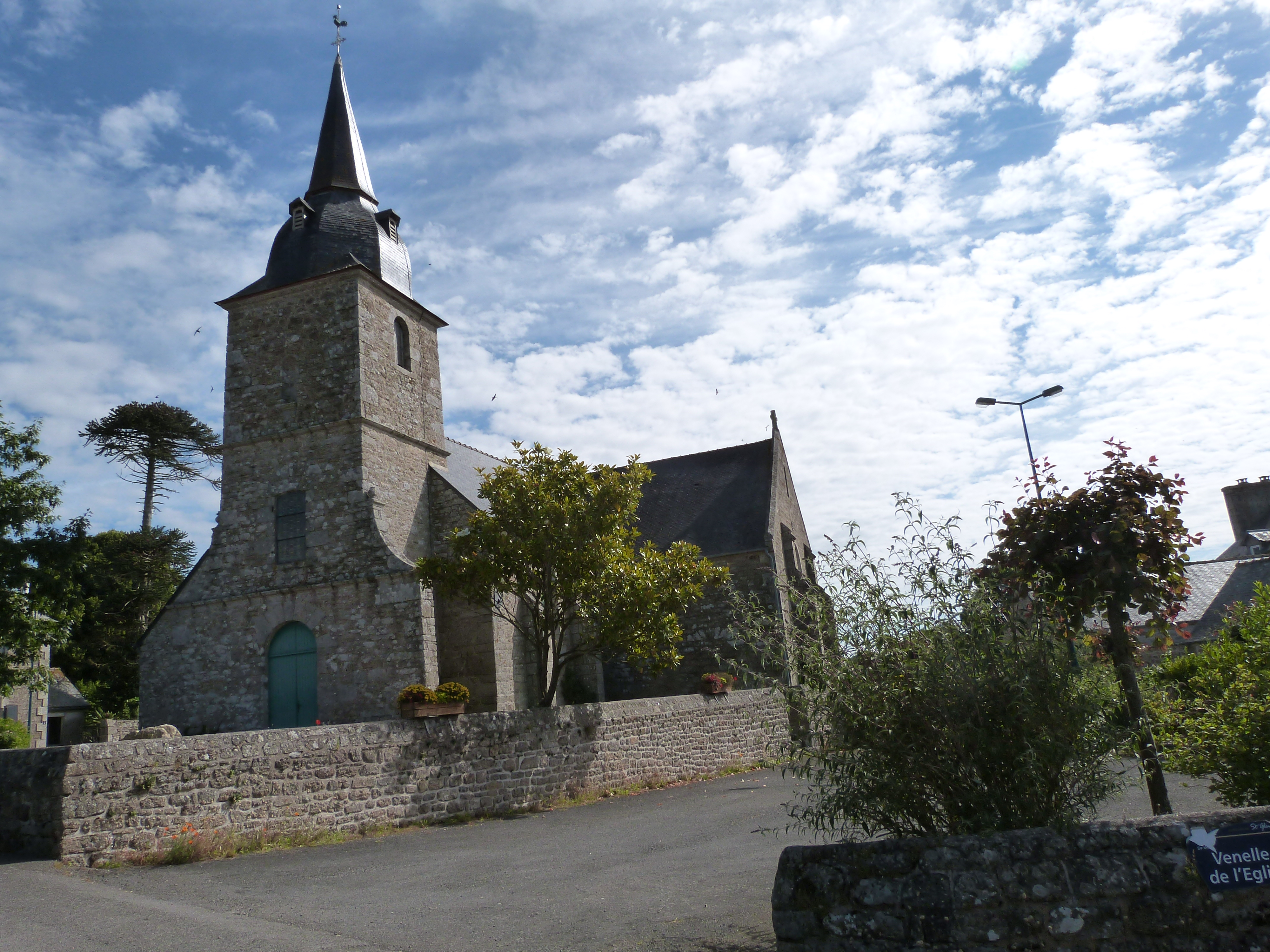 Enclos paroissial de Saint-Glen